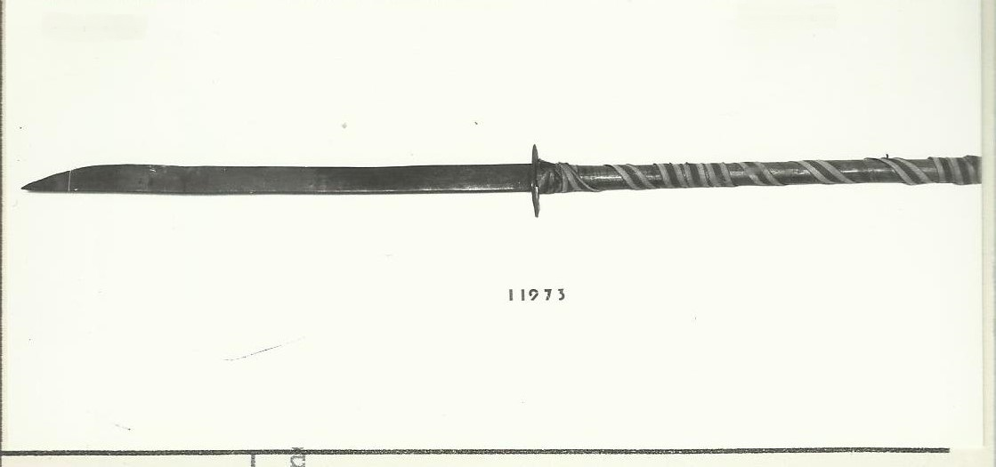 Kosa bojowa - naginata japońska, XIX wiek, Muzeum Azji i Pacyfiku w Warszawie